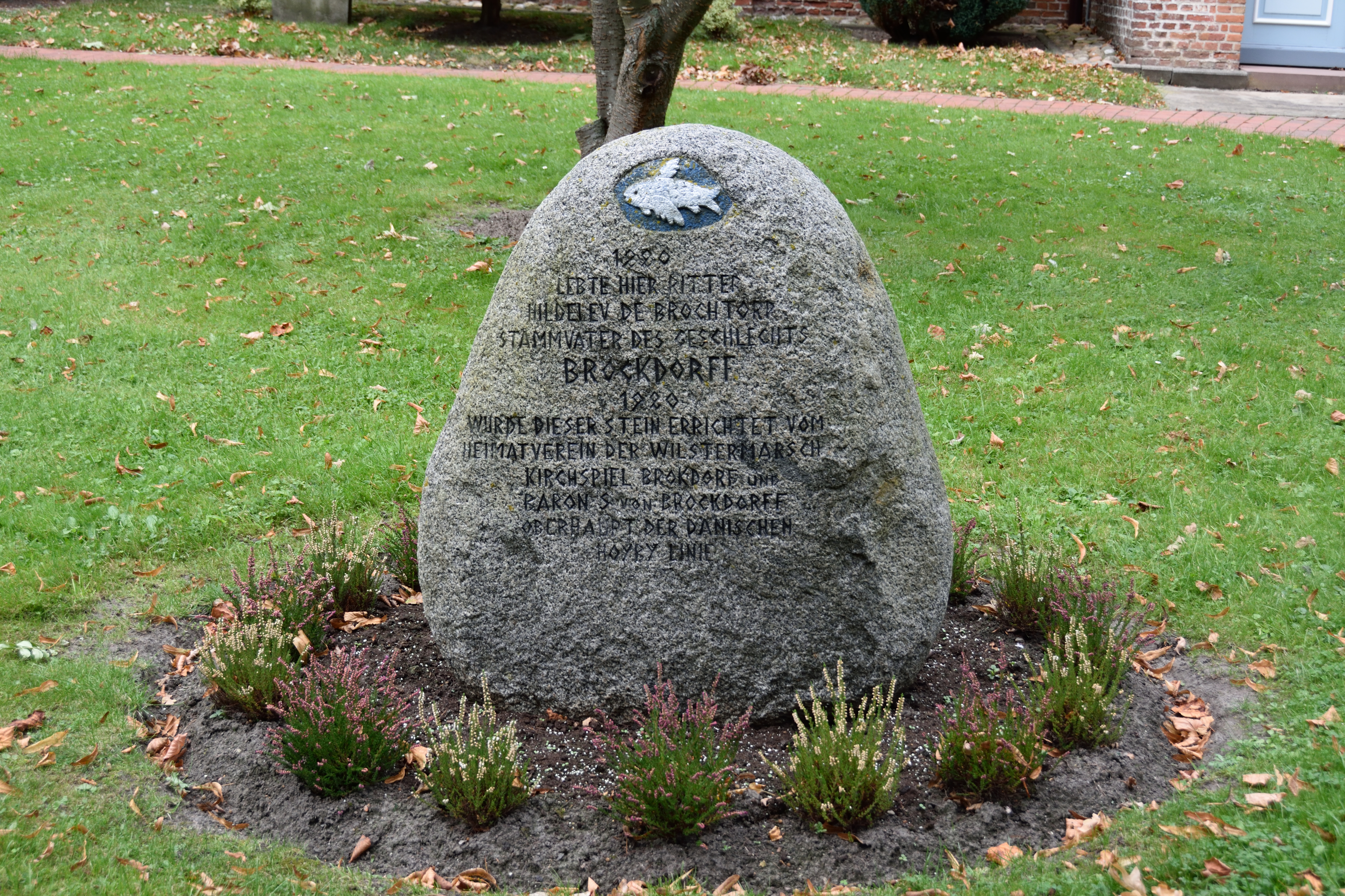 Erinnerung an Hildelevus de Bruchtorp an der Kirche in Brockdorf